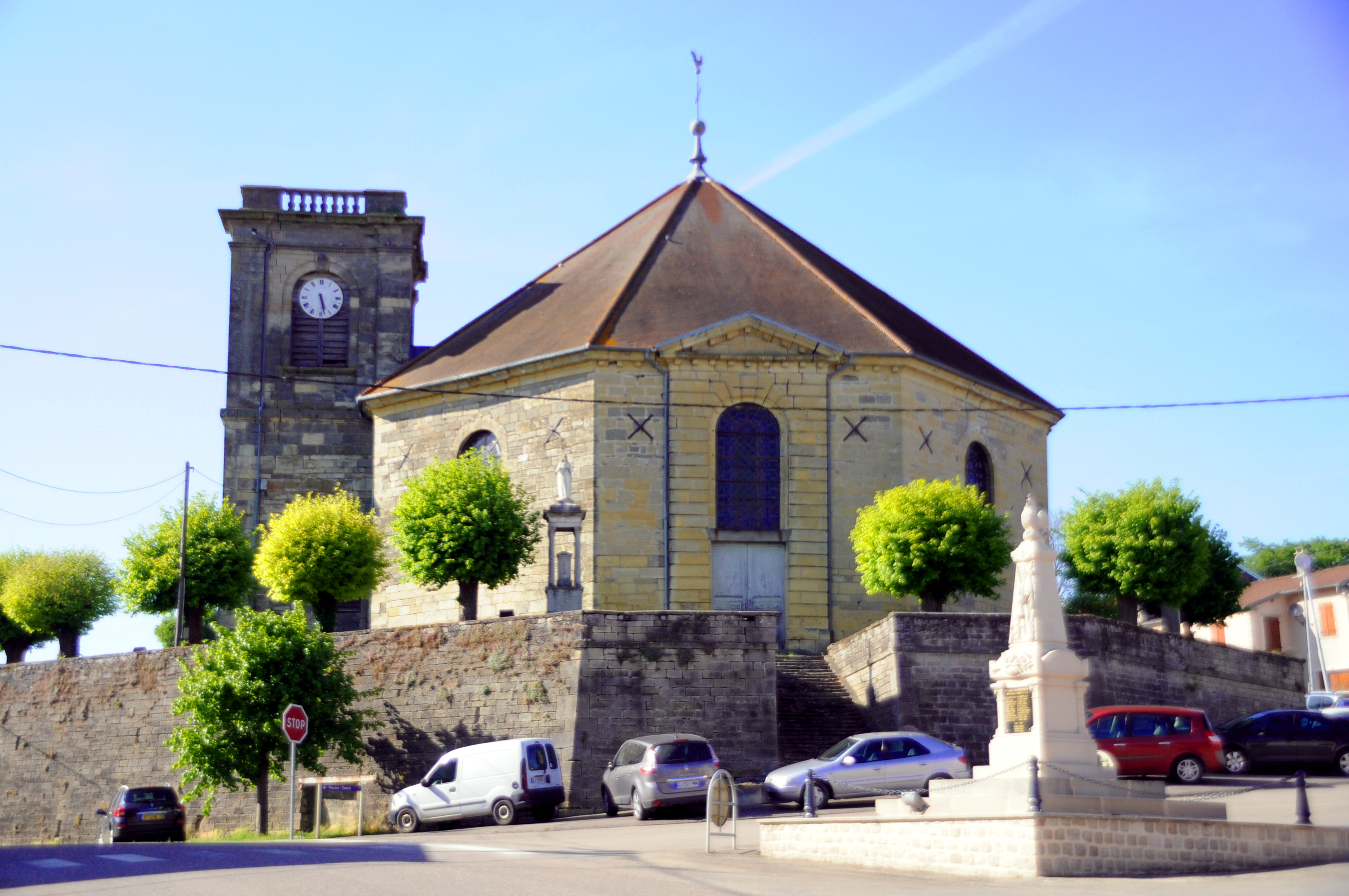 Église Saint-Martin de Blondefontaine .